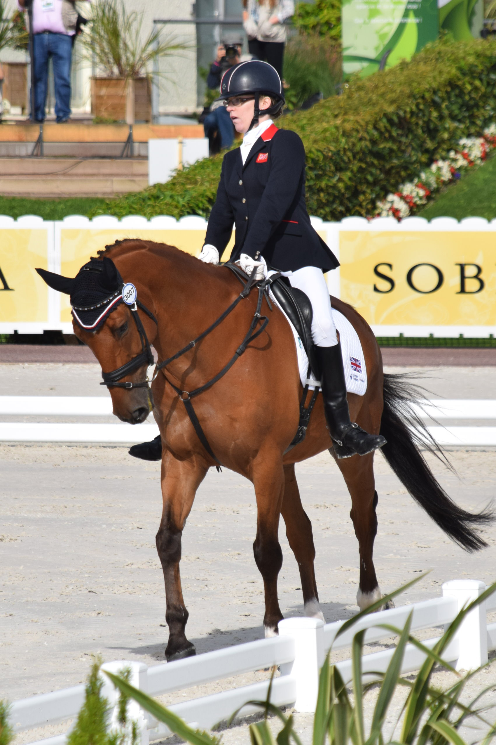 JEM 2014 : Sophie Christiansen et Janeiro 6 en dressage para-équestre (Grade Ia)